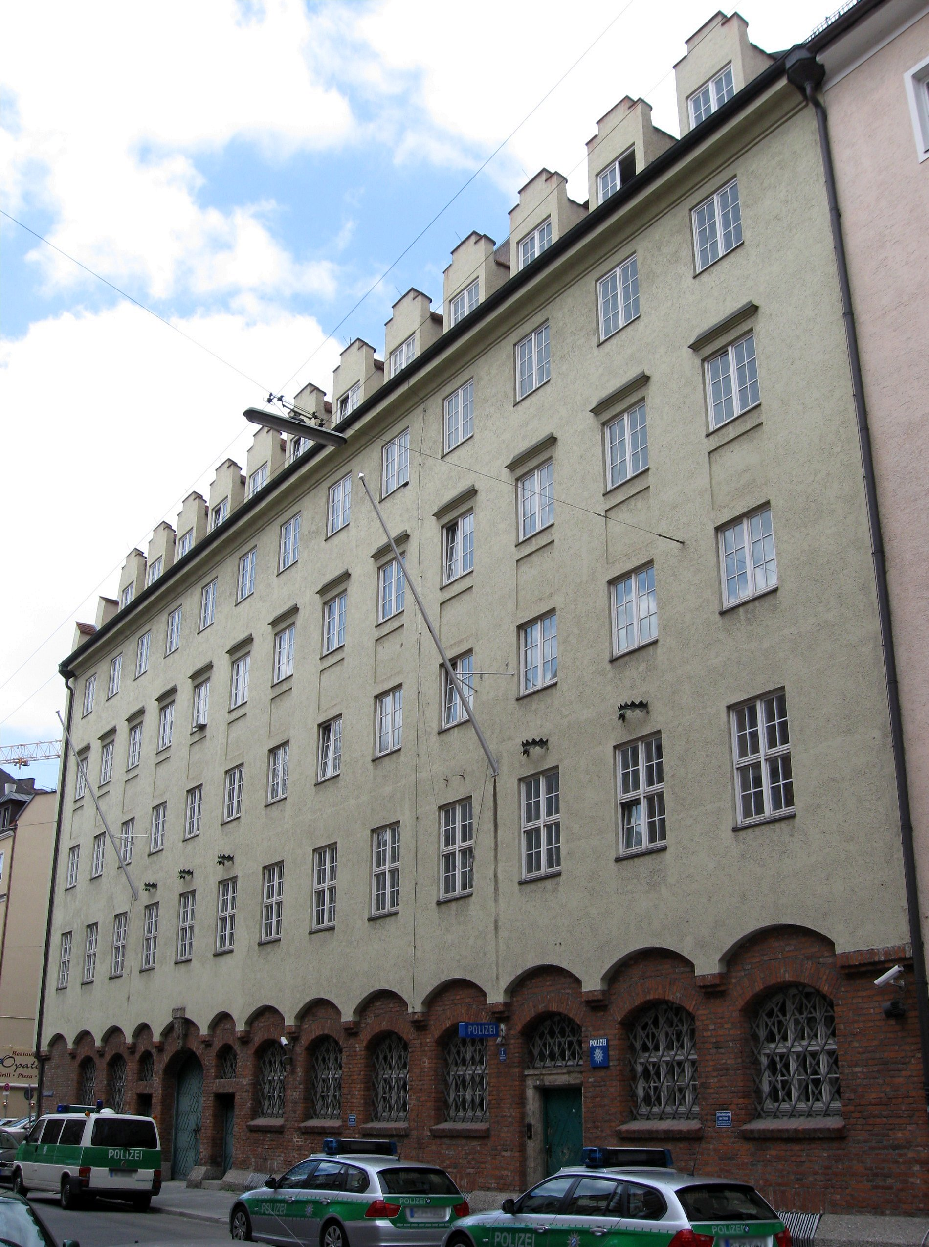 Hochbrückenstraße 7; Polizeiamt Nord. Polizeidienstgebäude, in sachlich-reduziert historisierenden Formen, 1923-25 von Rudolf Pfister.